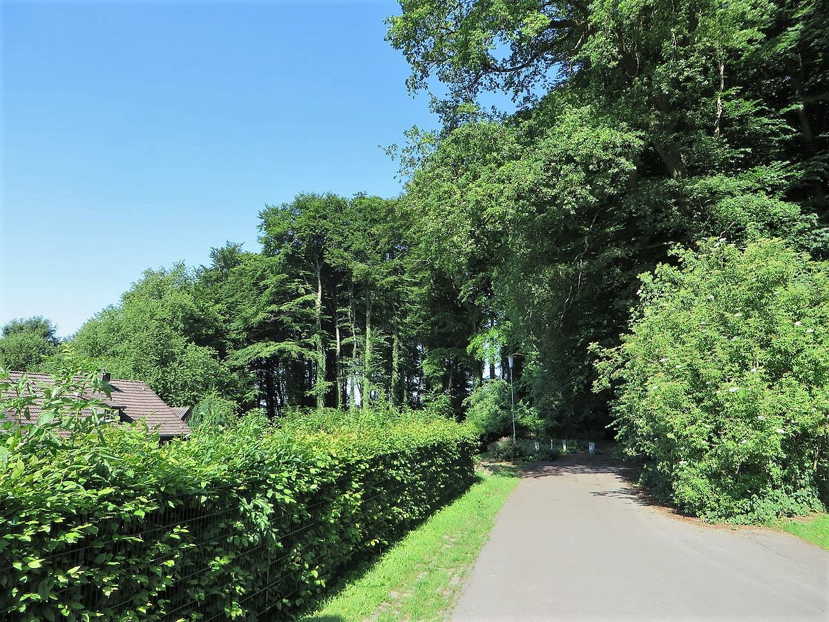 Geschützter Landschaftsbestandteil 1.4.2.49 „Hohenhof“ in Hagen, zwischen Stirnband-Siedlung und der A 45. Es handelt sich um einen Kalk-Buchenwald östlich des Hohenhofes mit gut ausgebildeter Krautschicht sowie angrenzenden Brachfluren.